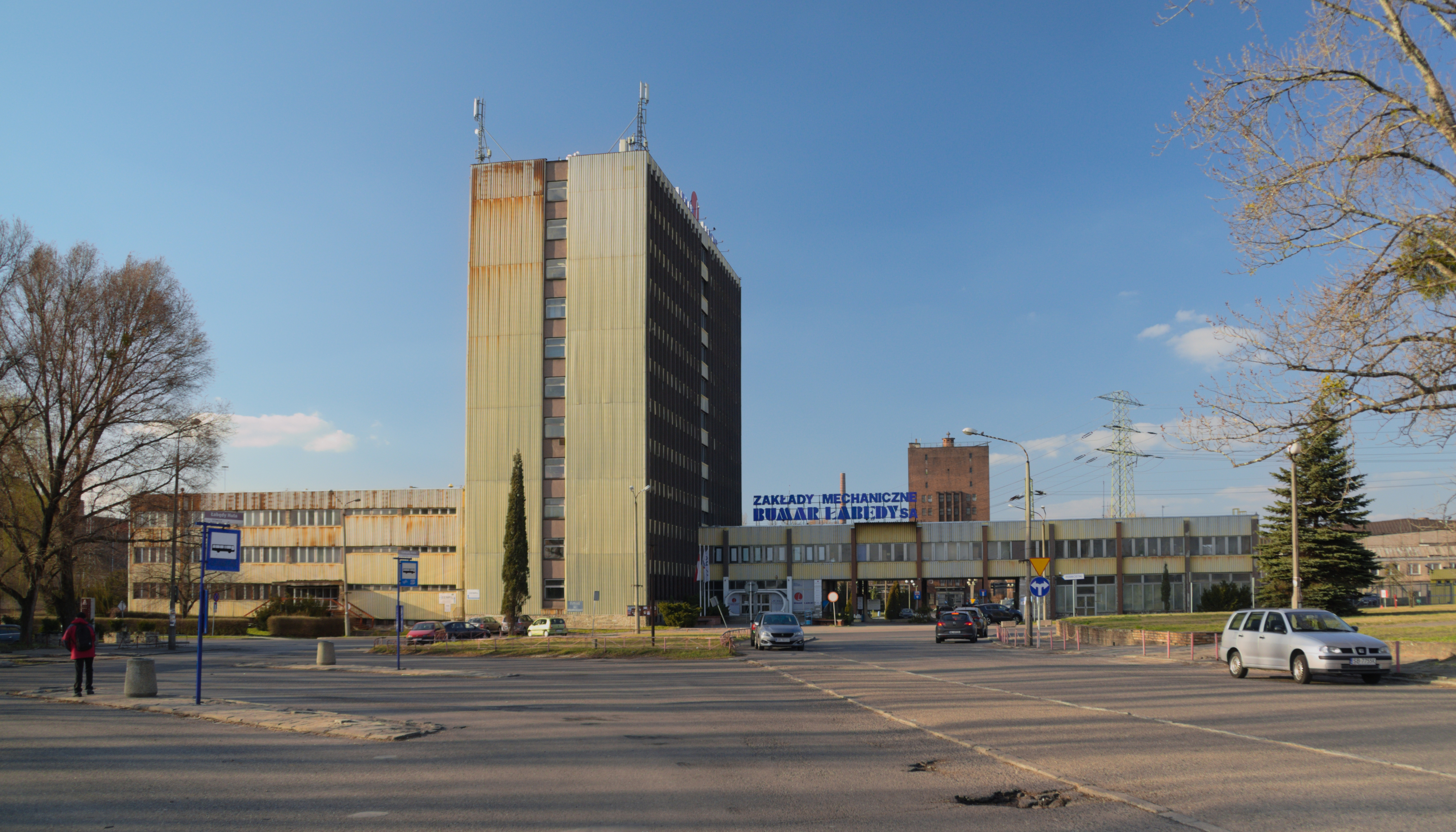 zabudowania Bumaru w Gliwicach, na pierwszym planie przystanek autobusowy Łabędy Huta, w oddali zakładowa wieża ciśnień z cegły